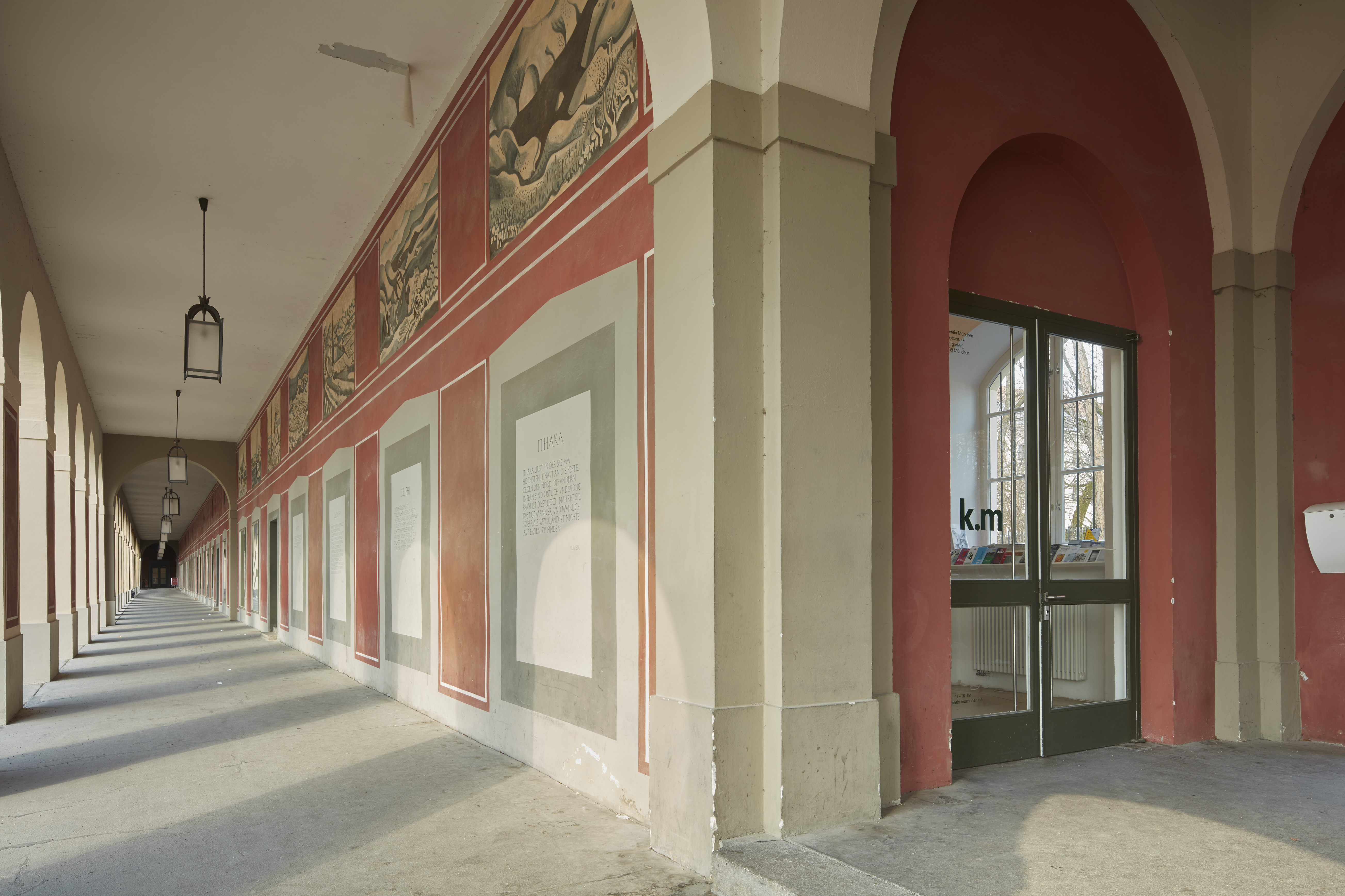 Kunstverein München Aussenansicht